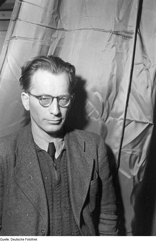 Original image description from the Deutsche Fotothek Porträts: H. Köhnen Bernard Koenen, Olga Körner, Eva Höhn, Gertrud Graeser (Rast), Walter Fisch, Maria Rentmeister